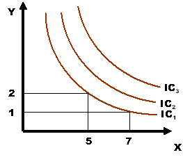 Běžný tvar indiferenčních křivek.